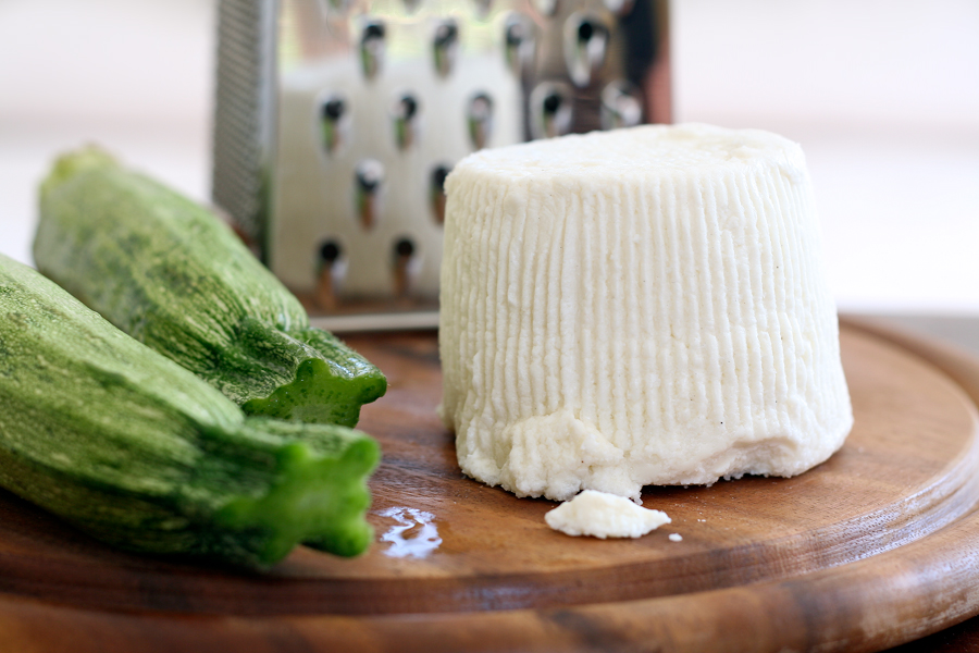 Ricotta cheese.